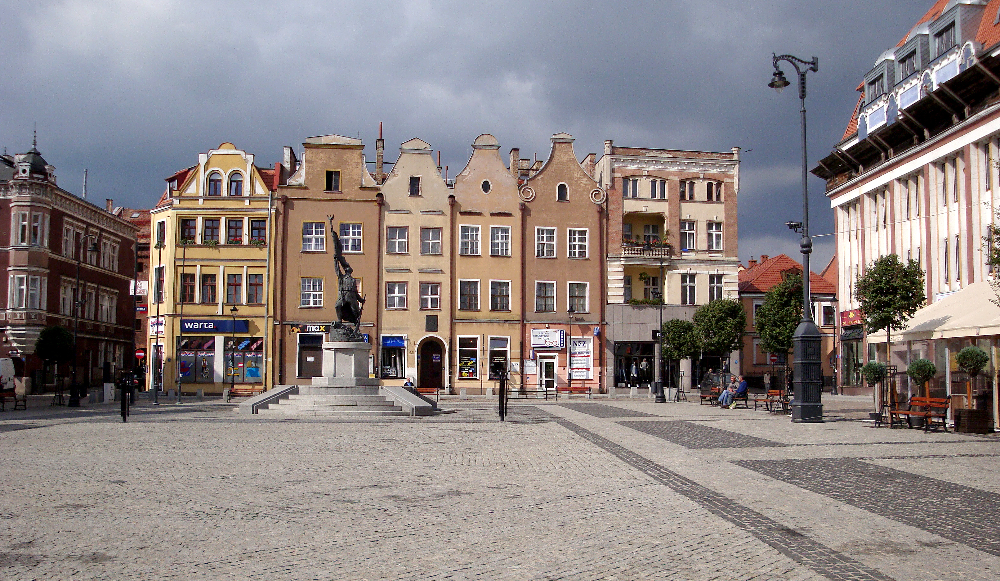 Grudziądz, dzielnica staromiejska, 1291, 2 poł. XIX